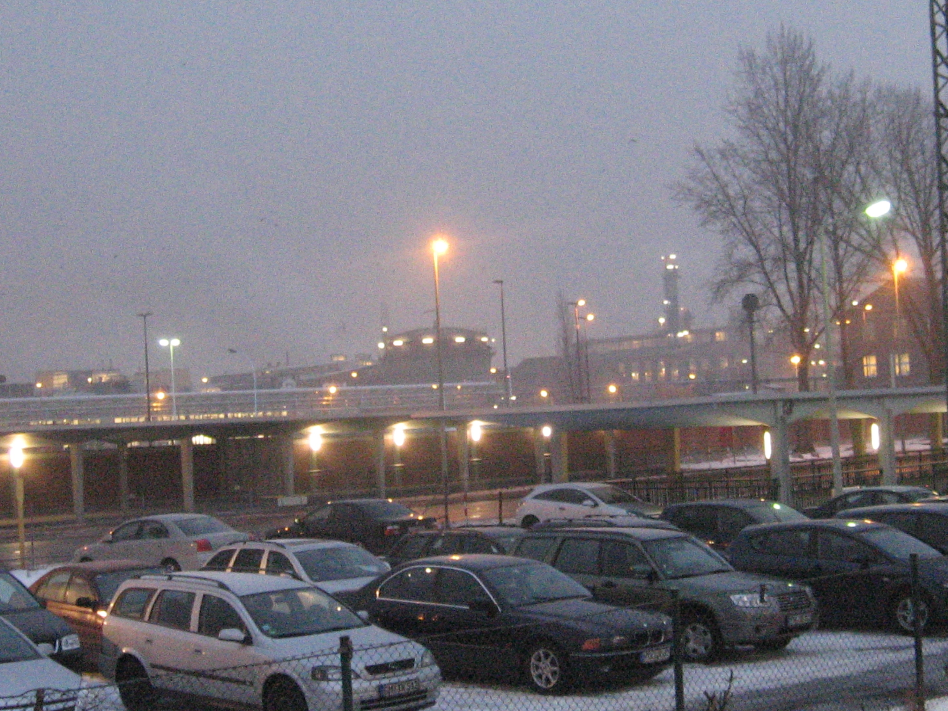 Farbwerke_Hoechst von Bahnhof Frankfurt-Höchst Farbwerke aus gesehen